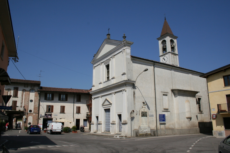 Barbata BG, la Parrocchiale